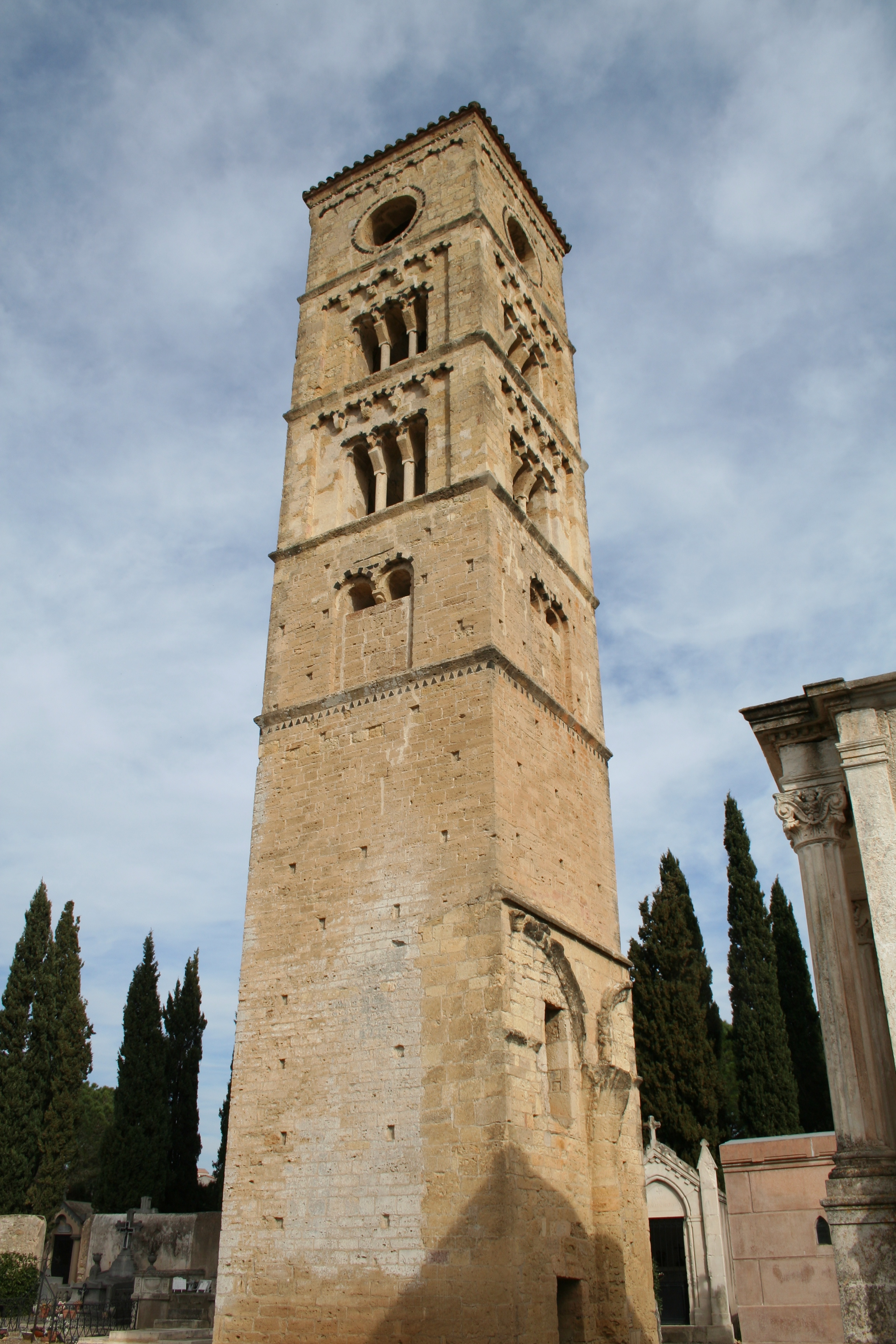 Puissalicon (Hérault) - clocher - (art roman).